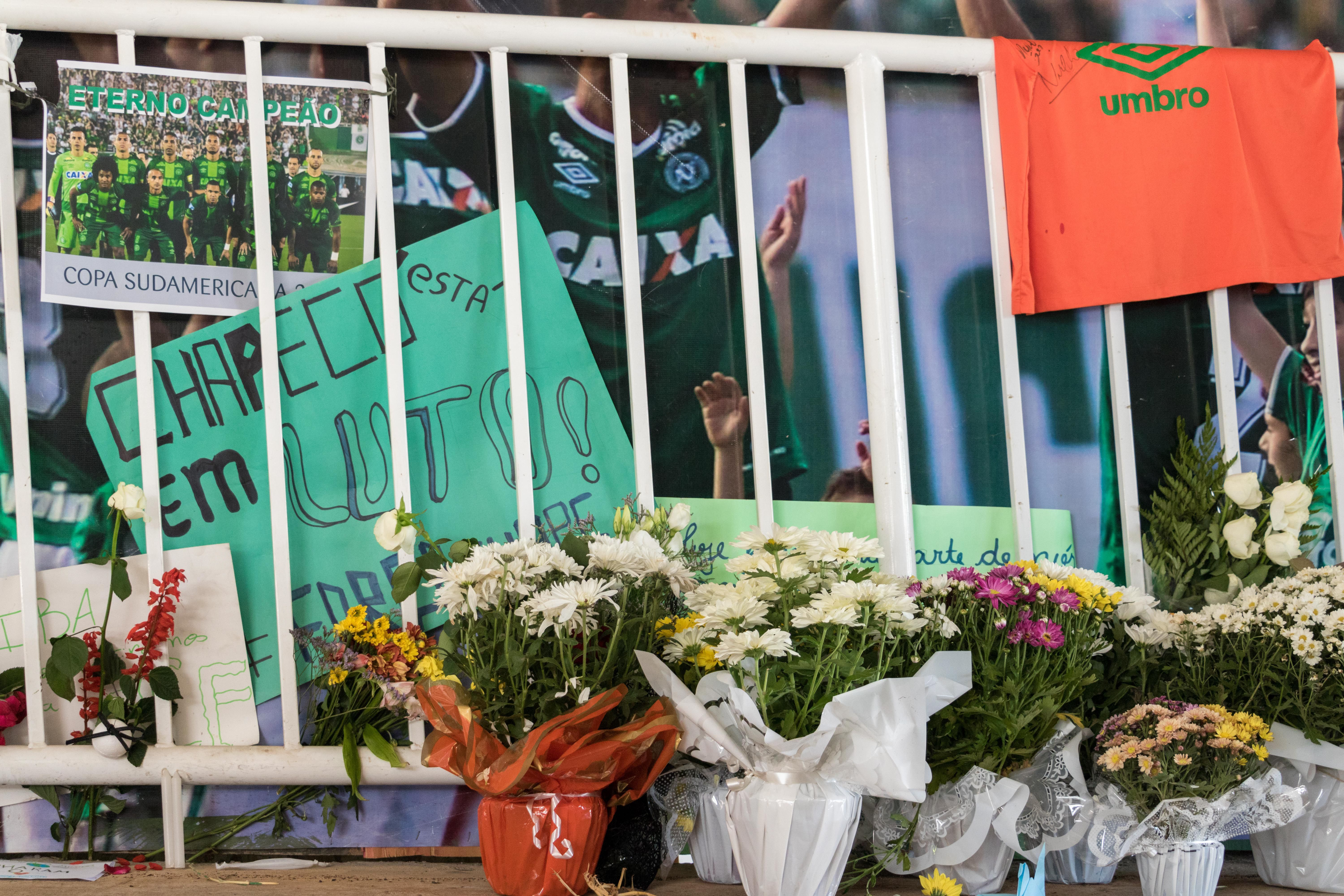 Chapecó (SC) - Arena Condá virou ponto de reunião de torcedores, jogadores e parentes das vítimas. Com cartazes, fotos e flores todos homenageiam os que morreram no acidente aéreo.